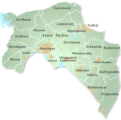 Toestemming van Jan Barkhof (j.barkhof AT provinciegroningen PUNT nl) voor het gebruik van deze afbeelding. Zie Wikipedia:De kluis voor e-mail. De Kluis -- NIET MEER GEBRUIKEN.